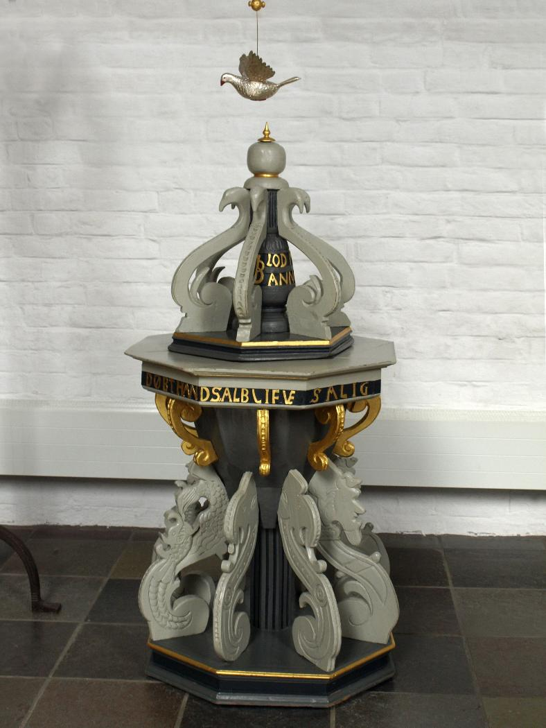 Saeby (Frederikshavn Kommune), Klosterkirche, Taufe, Foto 2014